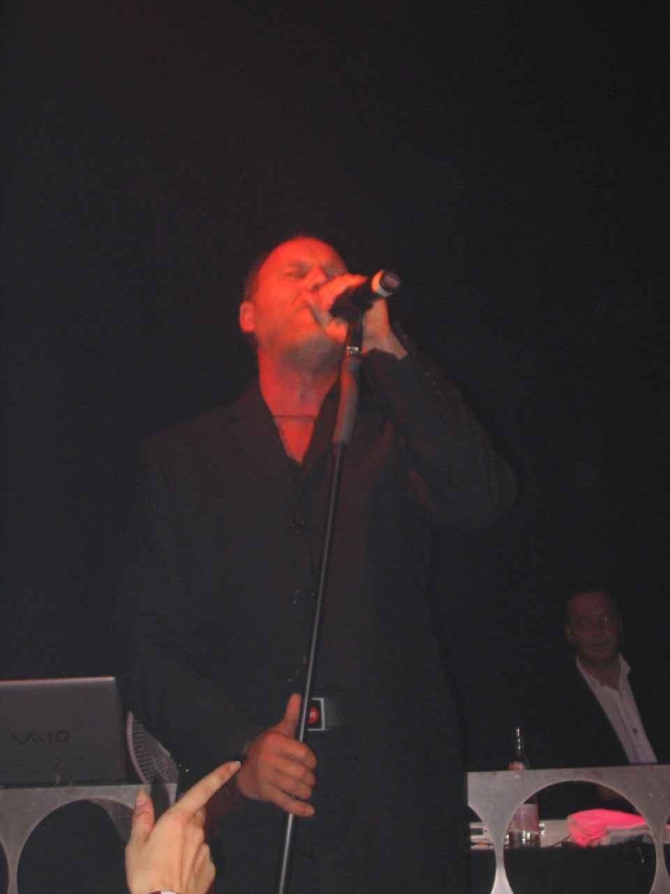 Olaf Henning at Cologne Pride 2006